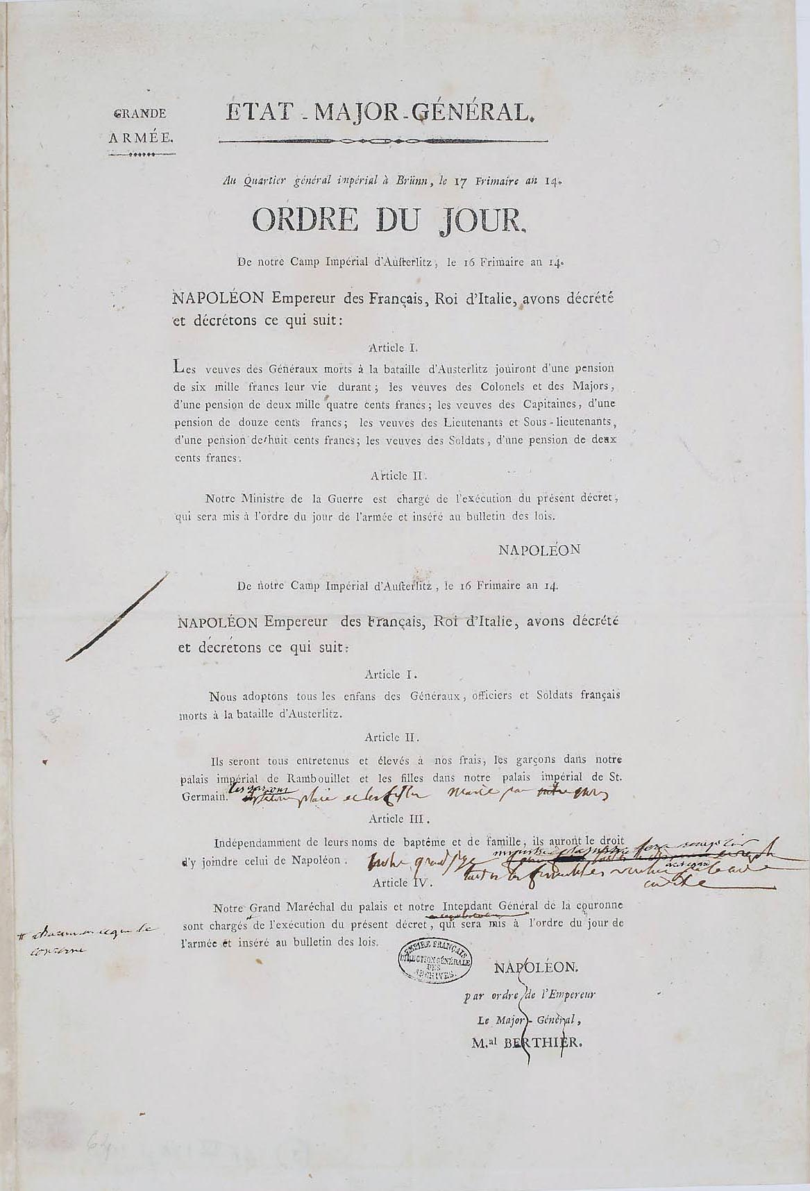 Ordre du jour de la Grande Armée, au camp d’Austerlitz, le 16 frimaire an XIV (7 décembre 1805). Napoléon décrète que les veuves des officiers et soldats toucheront une pension et que les enfants des généraux, officiers et soldats français morts à Austerlitz seront adoptés.